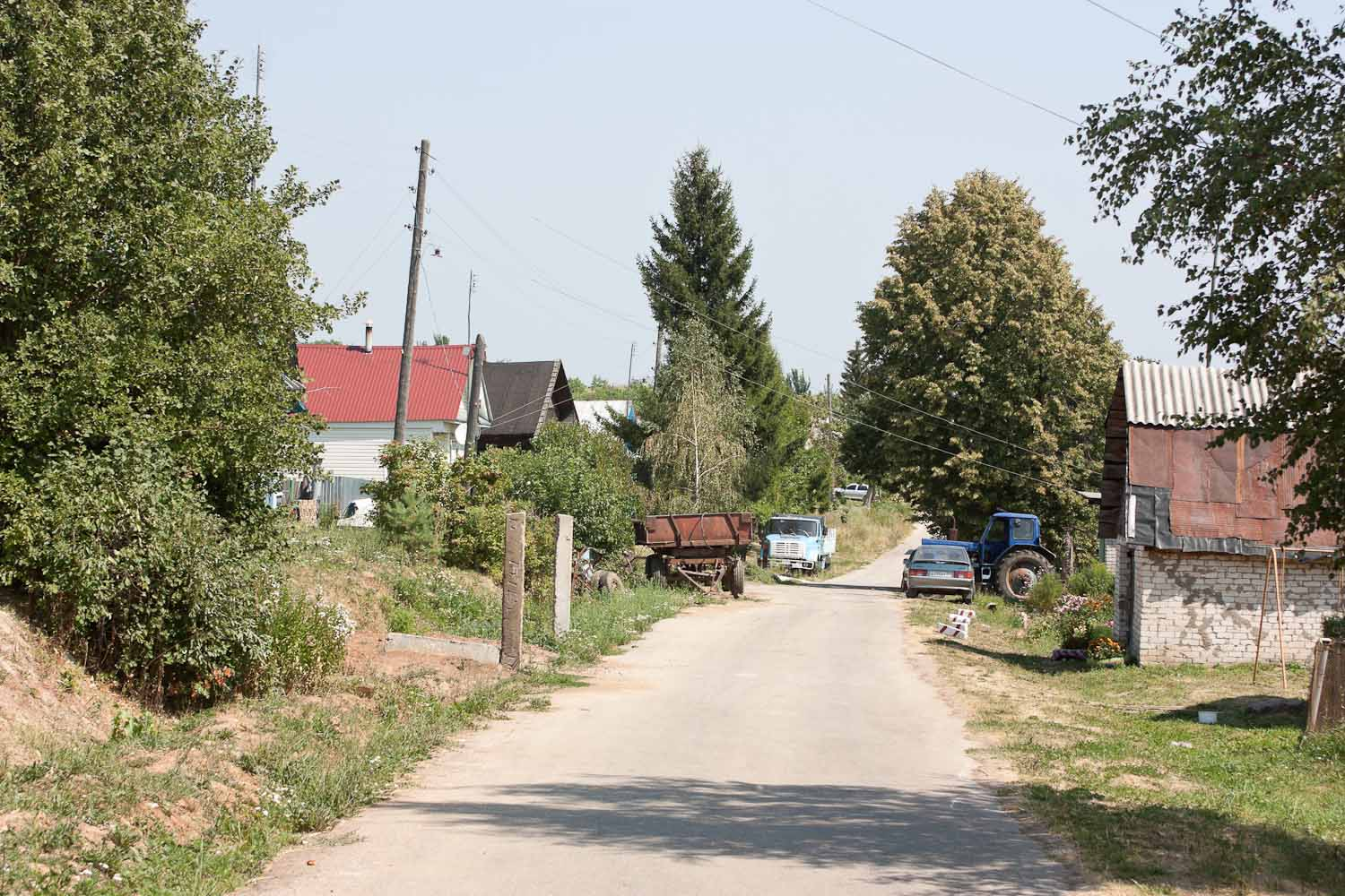 д.Кудрявцево (2010.07.25)